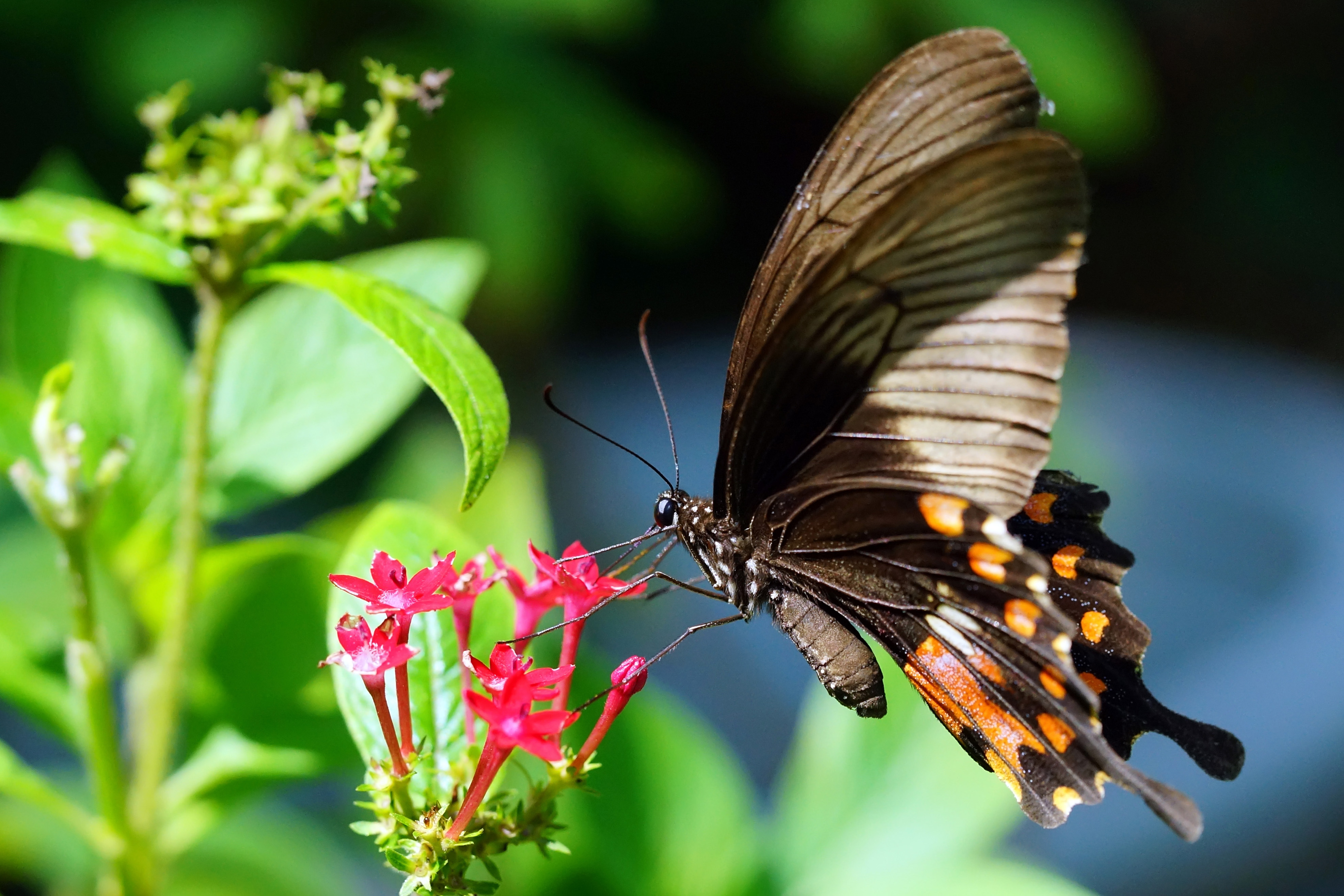 玉帶鳳蝶 Papilio polytes polytes